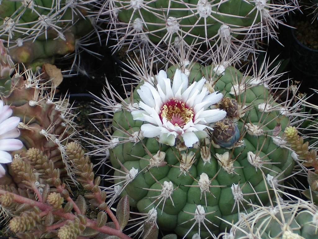 Gymnocalycium pflanzii (Gymnocalycium comarapense)